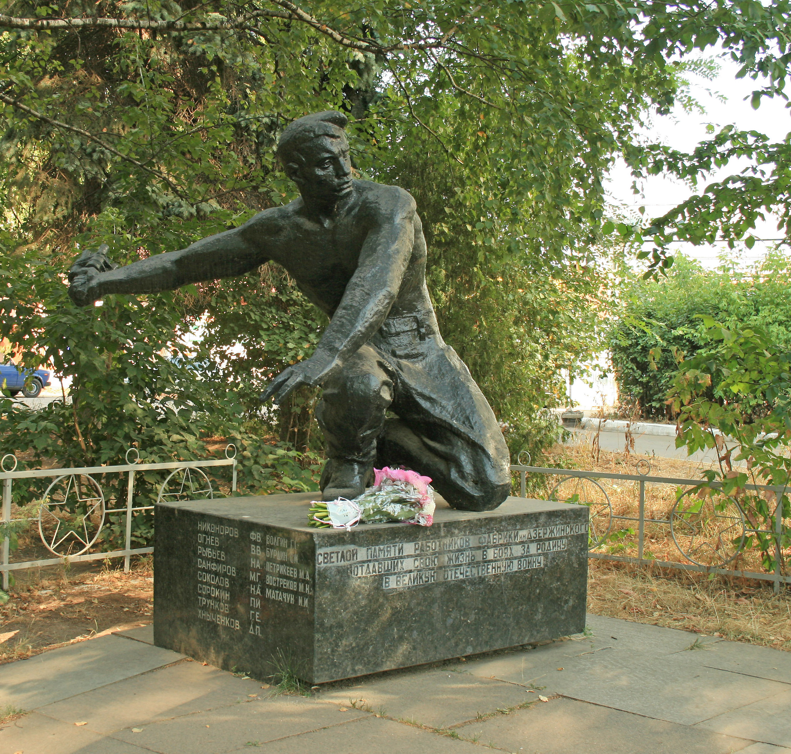 Мемориал «Последний бросок». Памятник работникам фабрики им. Дзержинского, павшим в боях в Великую отечественную войну. Скульптор М. Цветков. Установлен в 1965. Ивантеевка.